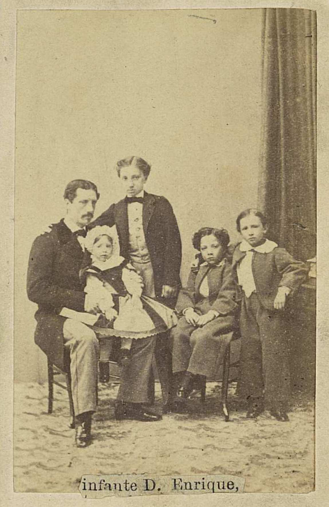 Fotografía familiar del infante don Enrique. Biblioteca Nacional de España.